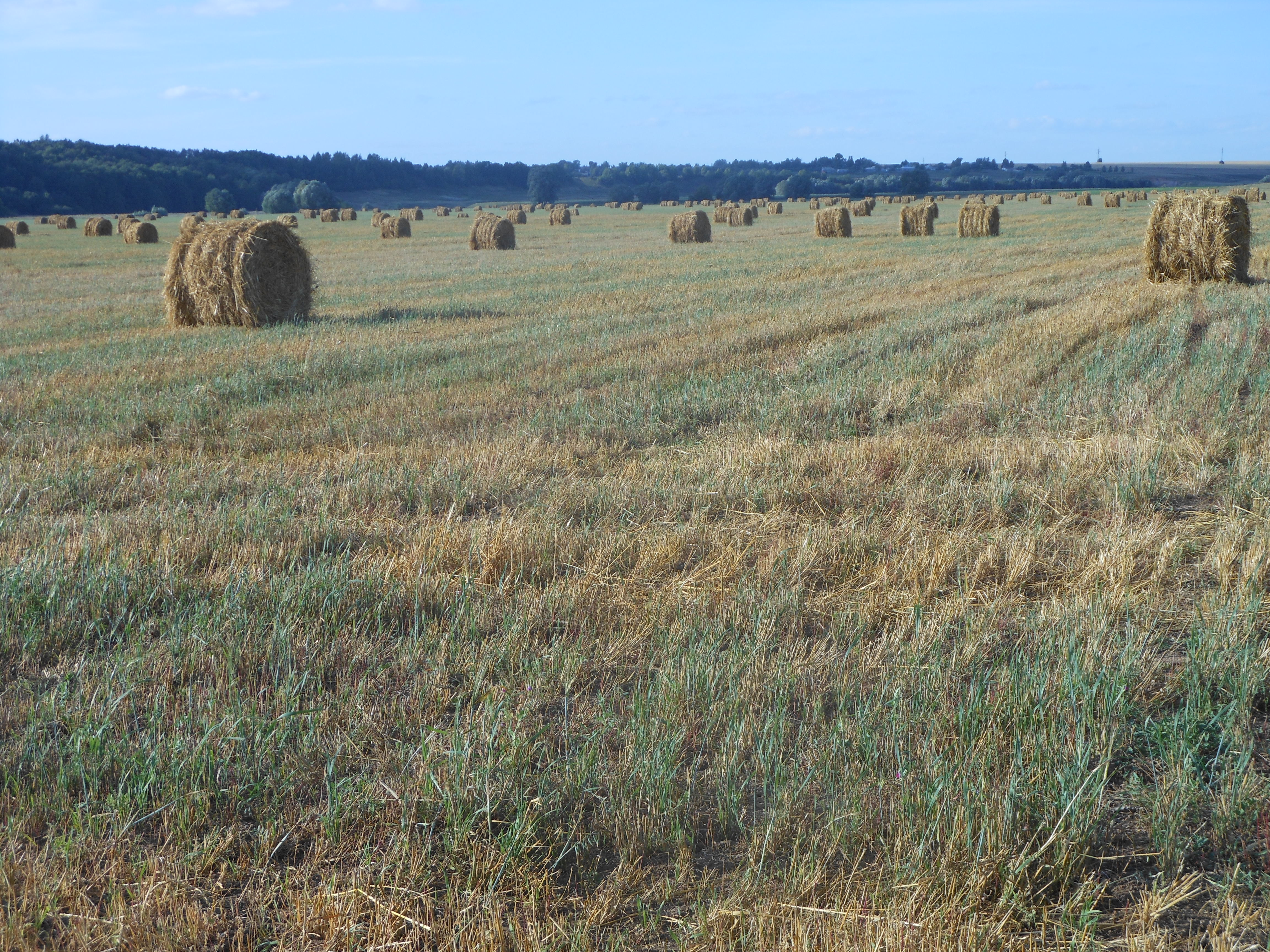 Августовская страда в долине реки Цивиль